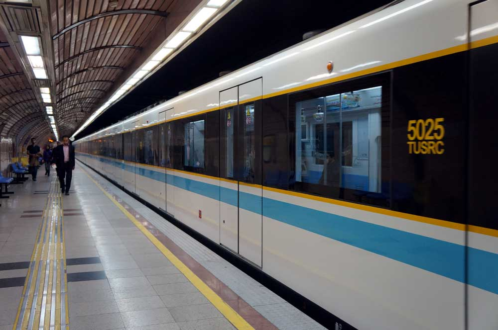 Shahr Rey, Iran 2013 (20)